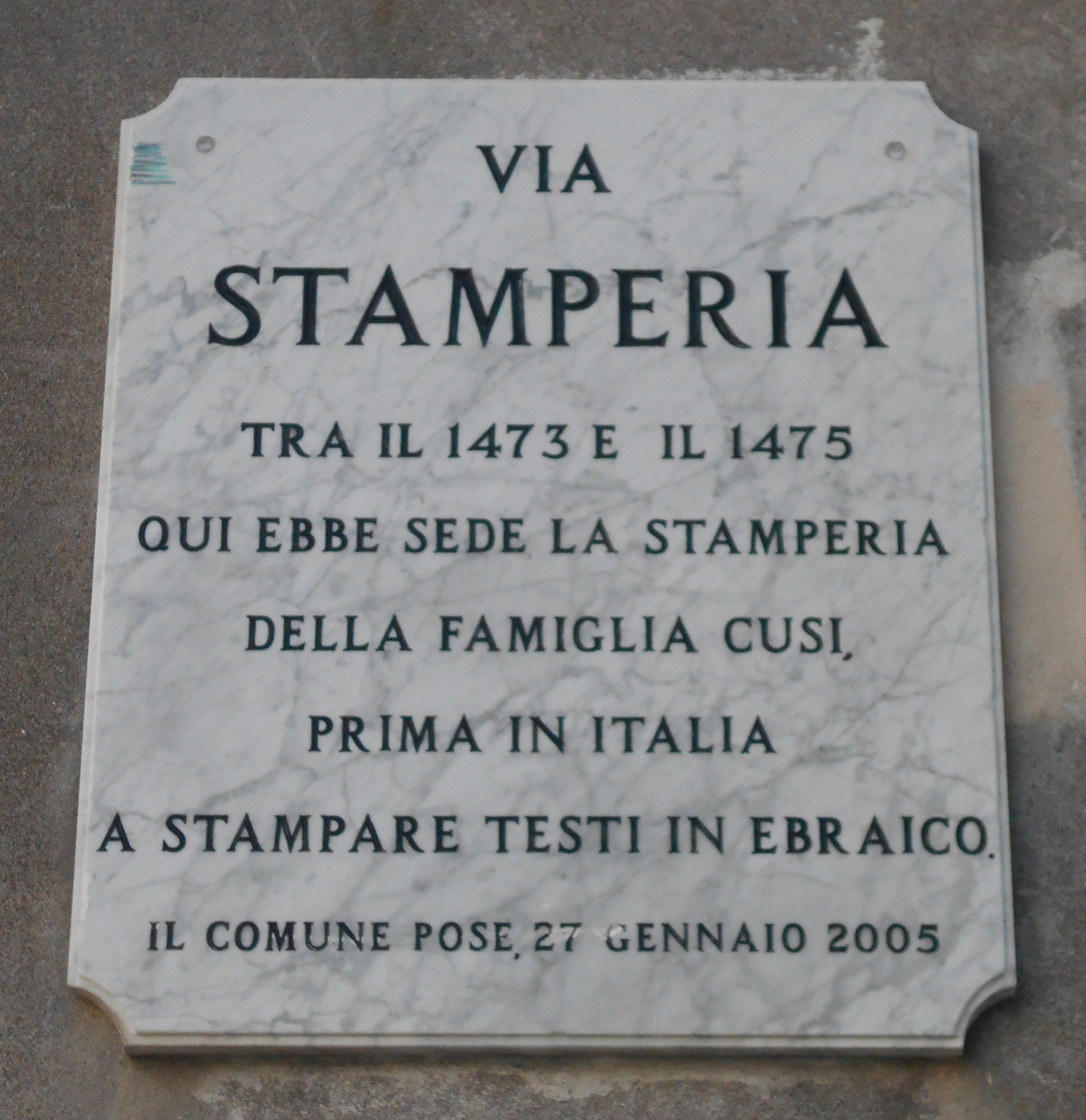 Stamperia Cusi, Piove di Sacco